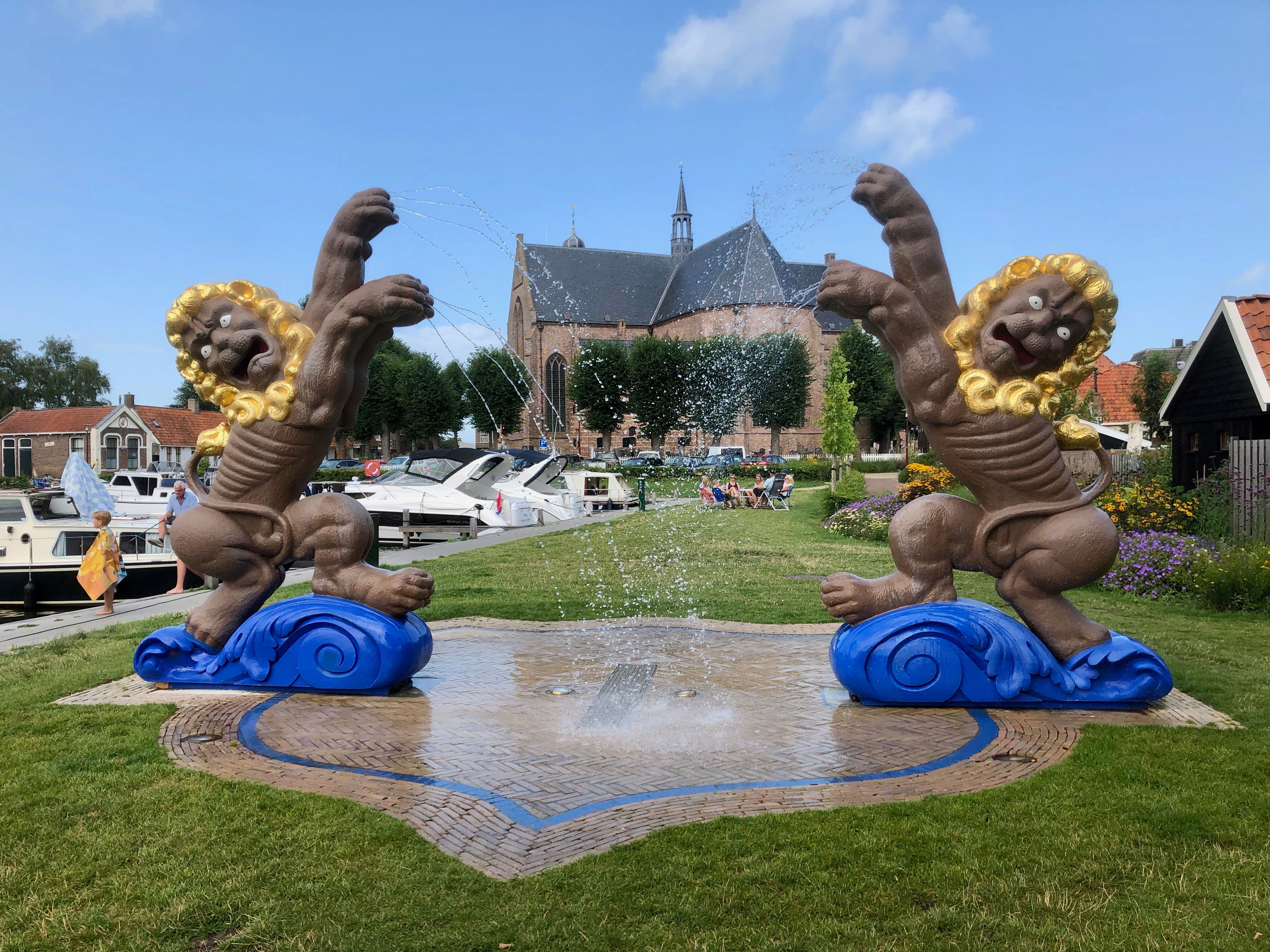 De woeste leeuwen van Workum door Cornelia Parker in Workum